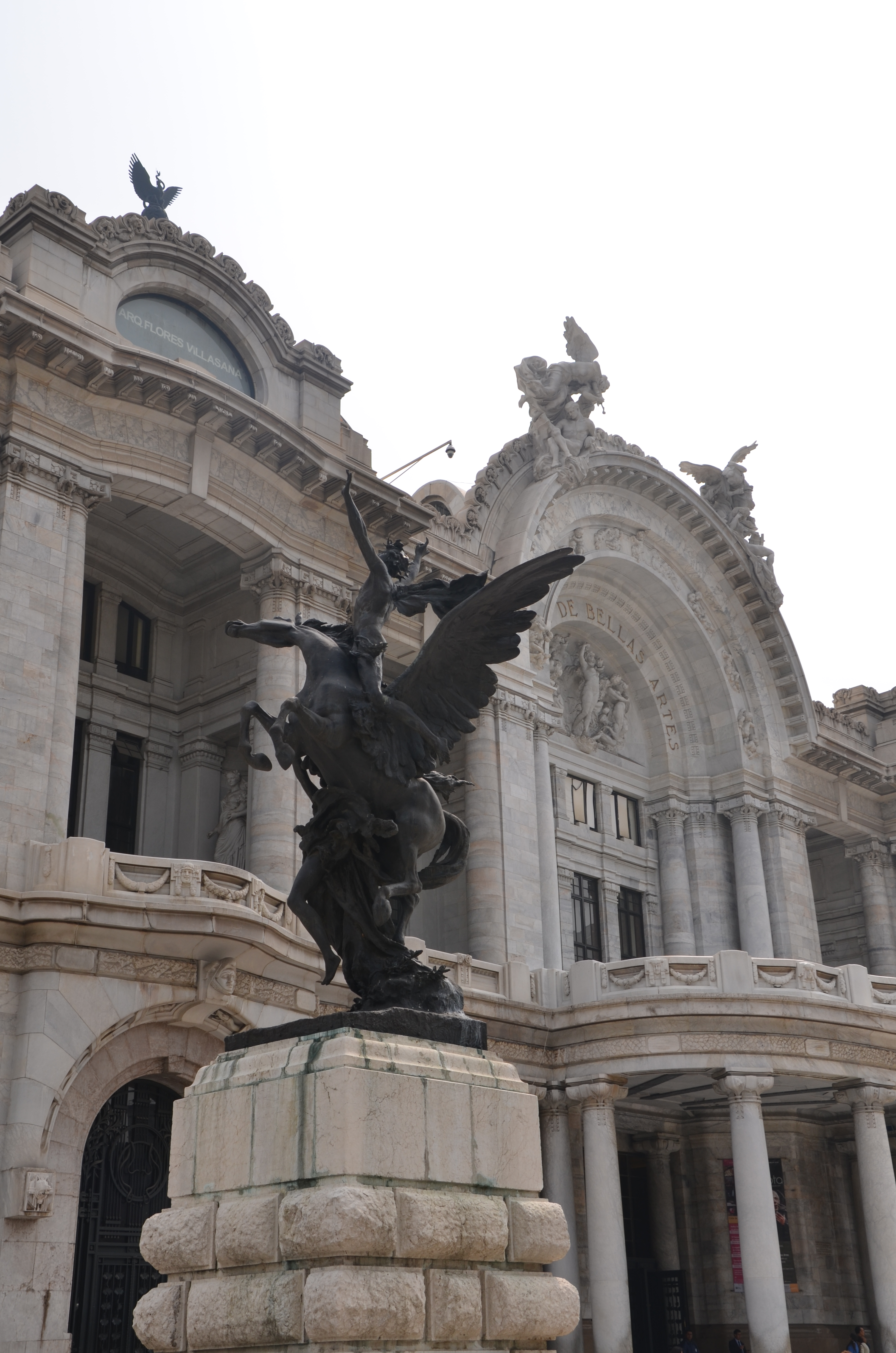 Escultura de Pegaso de Agustín Querol. Palacio de Bellas Artes, Ciudad de México